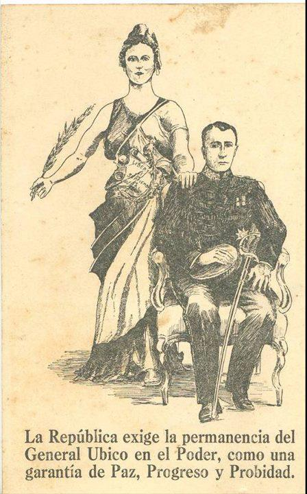 Referendum de Ubico. Afiche de propaganda del Gobierno de Guatemala para Ubico.